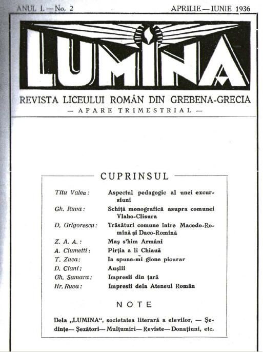 Лумина, 1936 №2